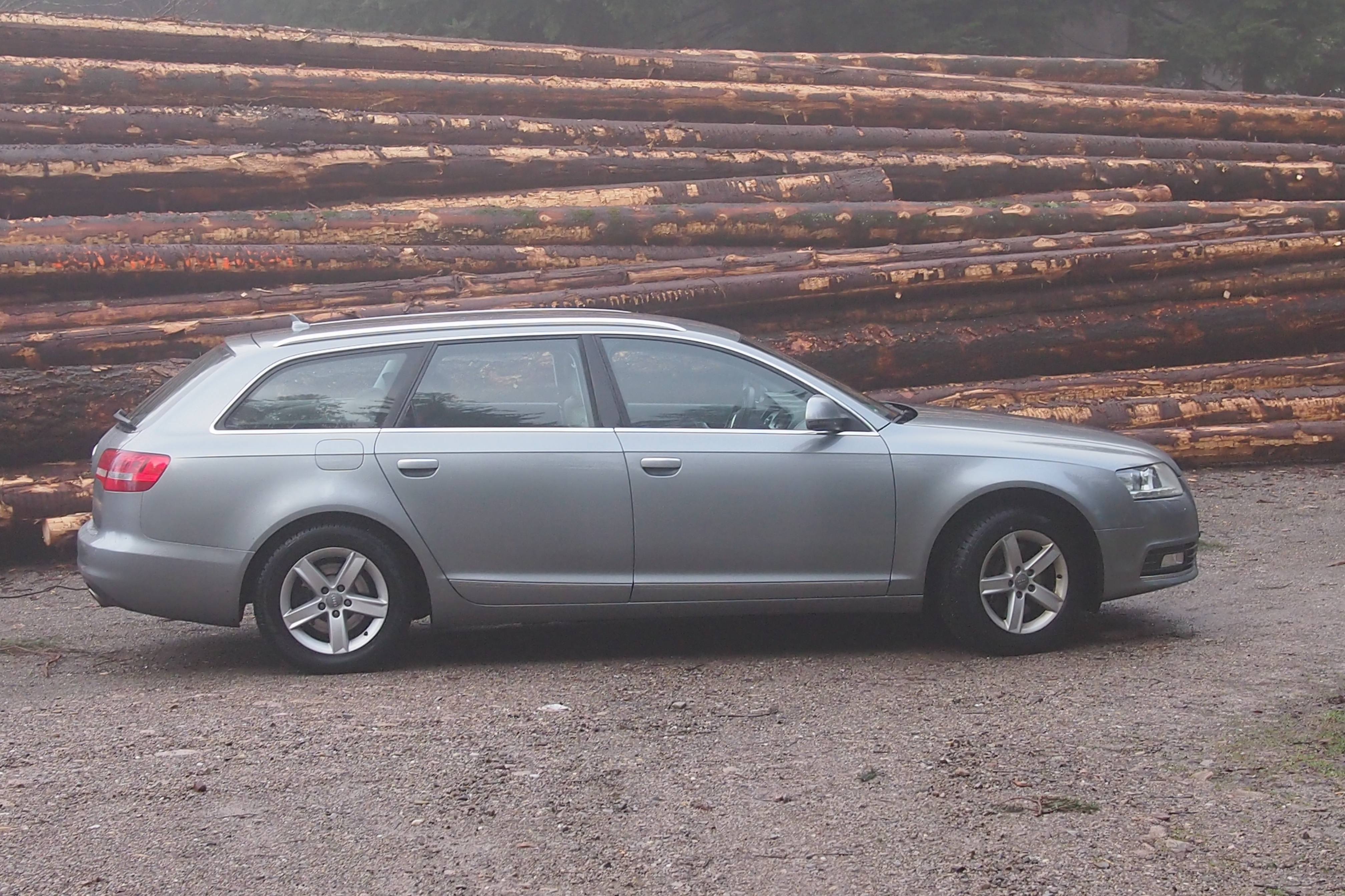 Audi A6 Avant 6F (Facelift), Modelljahr 2011